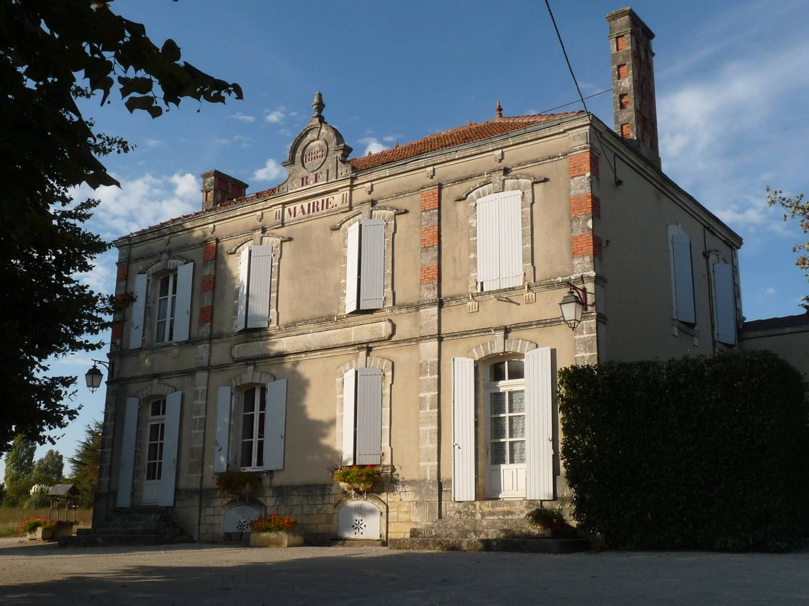 mairie de Couture, Charente, France